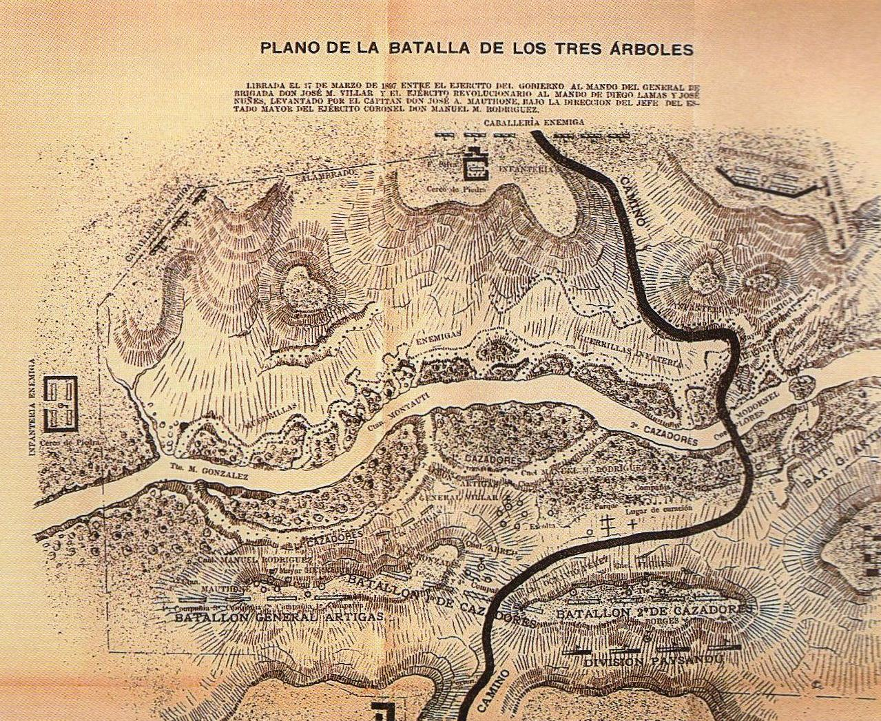 Plano gubernista que ilustra la batalla de Tres Árboles, librada en el marco de la Revolución de 1897, en Uruguay.